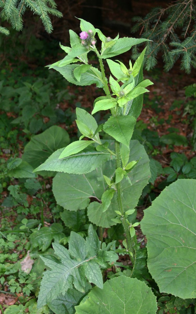 Kletten-Ringdistel (Carduus personata), Korbblütler (Asteraceae) - Österreich/Austria/Autriche: Oberösterreich, Hausruckviertel, Kien NW Attnang-Puchheim